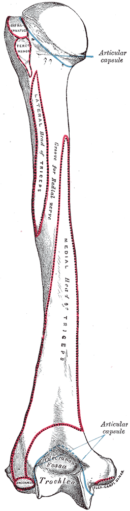 Left humerus. Posterior view.